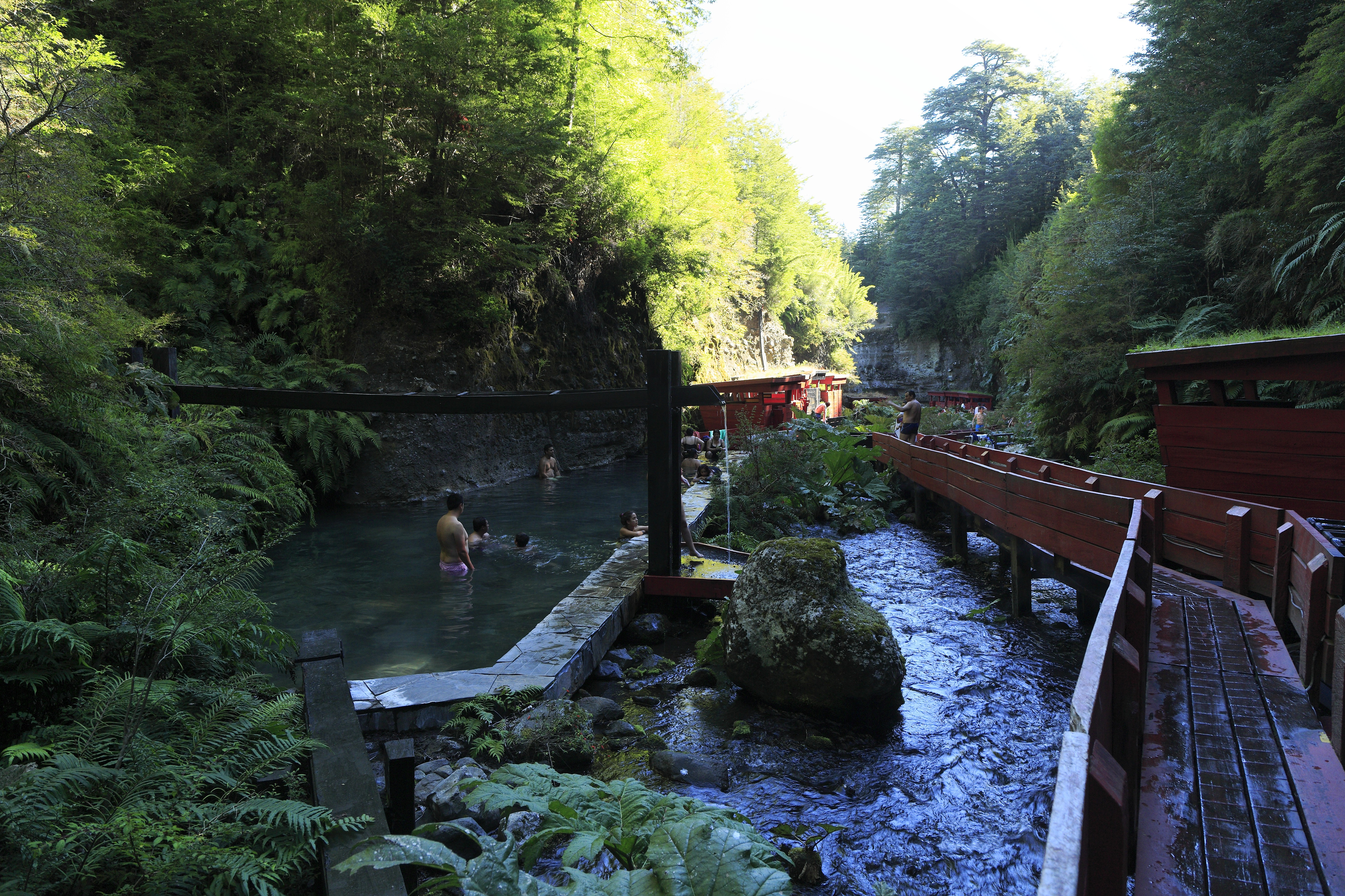 Talwärts, Mittelteil mit Wasserbecken sowie Umkleide- und Sanitärhütten.